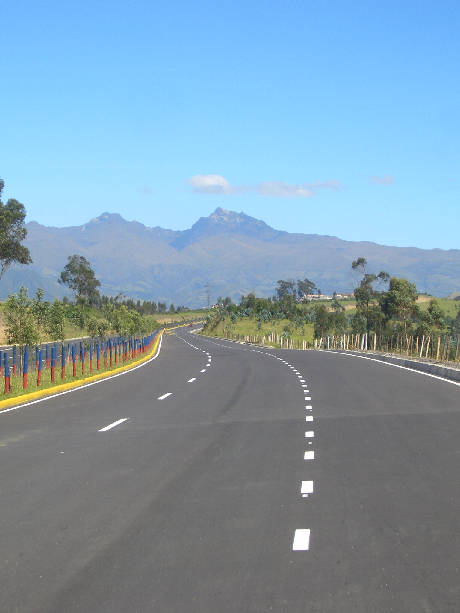 Nueva via oriental in Quitoa, Ecuador